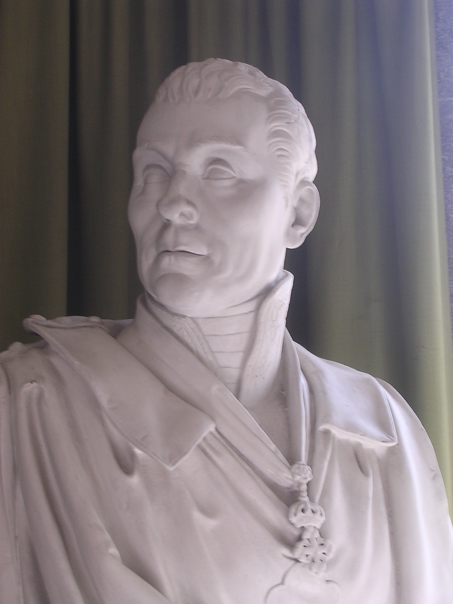 Statue de Benoît de Boigne, général, comte, et homme politique français, 1751-1830. Sculptée au milieu du XIXème siècle. Exposée au sein de la Maison Saint-Benoît, Chambéry, France. Détail.